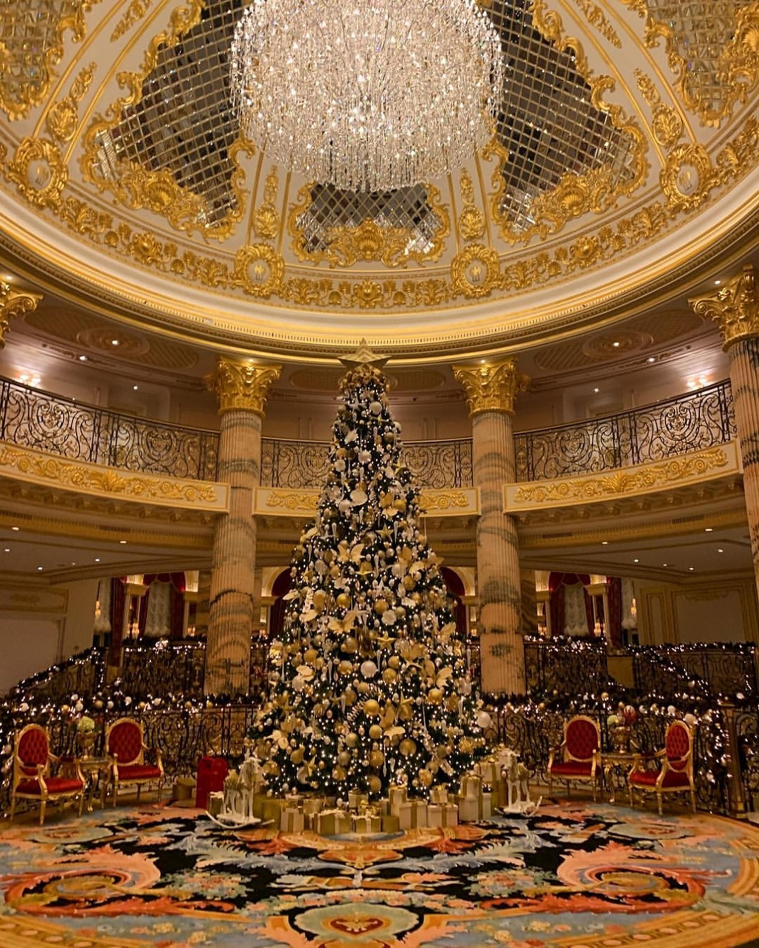 Էմերալդ Կեմպինսկի ընդունարան՝ պատված 24 կարատ մաքրության ոսկյա ձուլակտորներով։